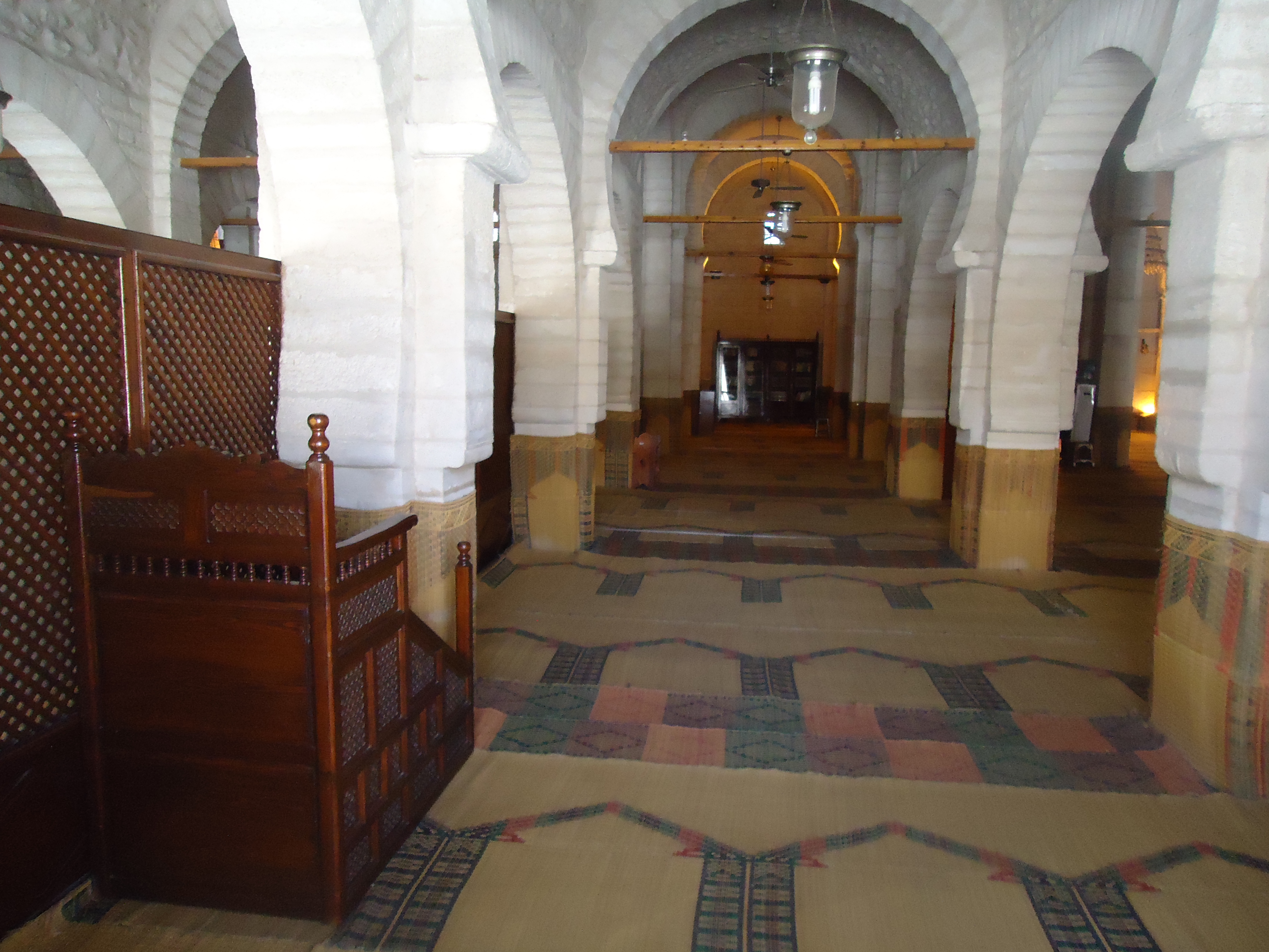 Тунис. Сүс ҡалаһындағы Бөйөк мәсетең намаҙ залы